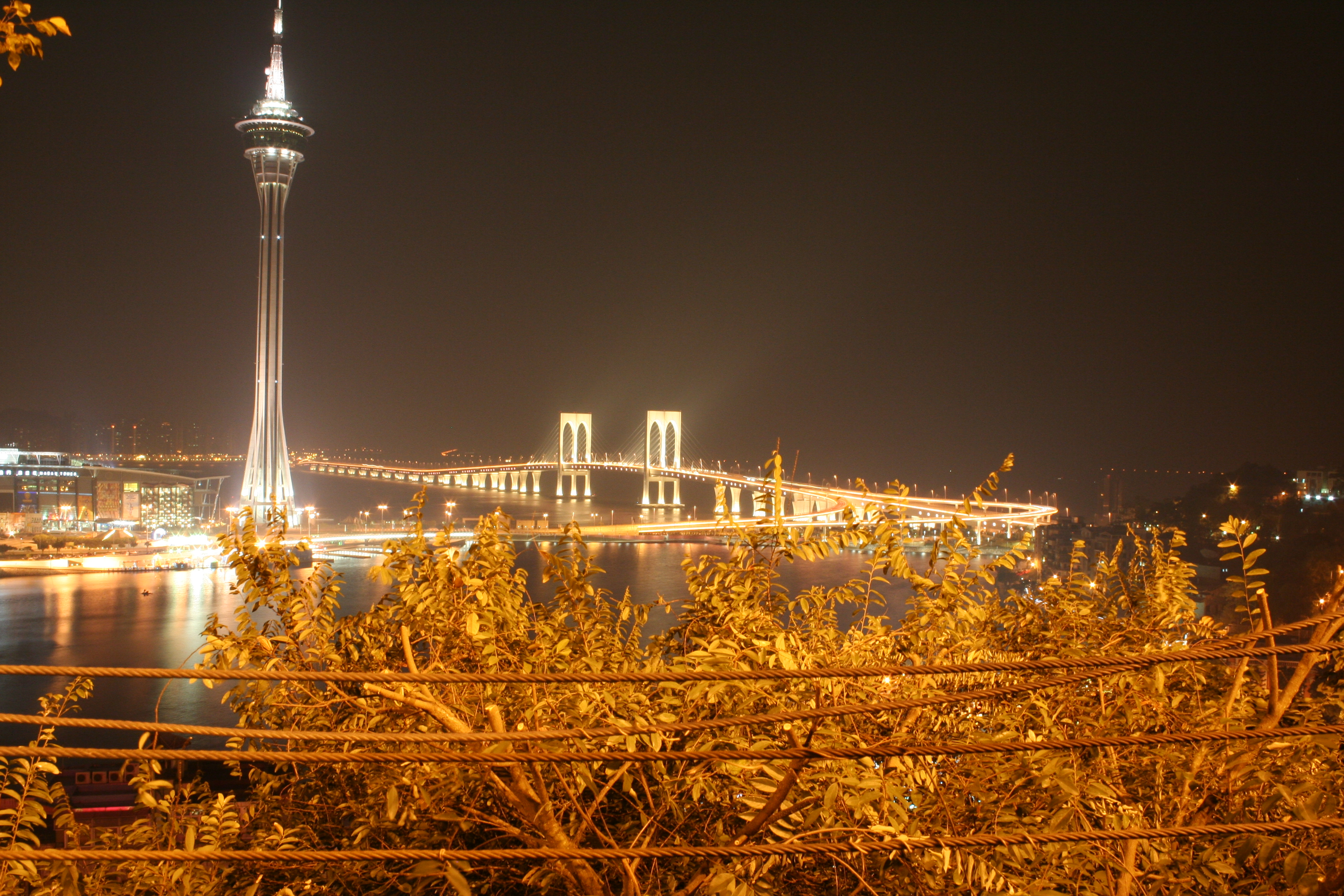 Macao by night